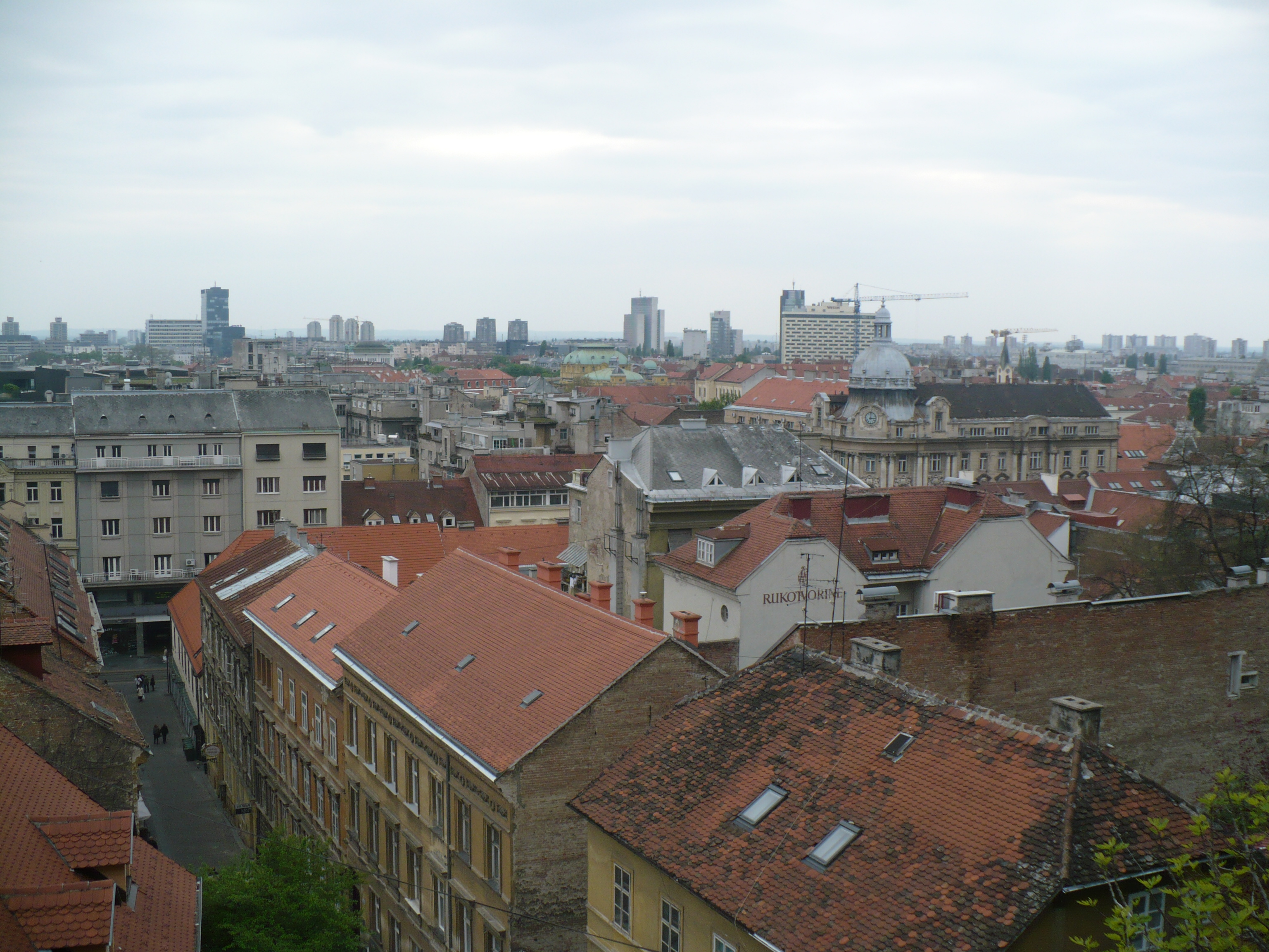 Zagreb, Hırvatistan